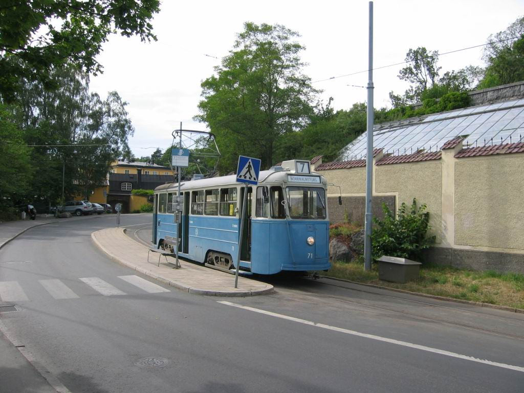 Stockholms Spårvägar Class A25G no. 71 at Waldemarsudde at Djurgårdslinjen in Stockholm. This tram is originally from Malmö but have been at Djurgårdslinjen since 1992. More information about this tram at Swetramway.